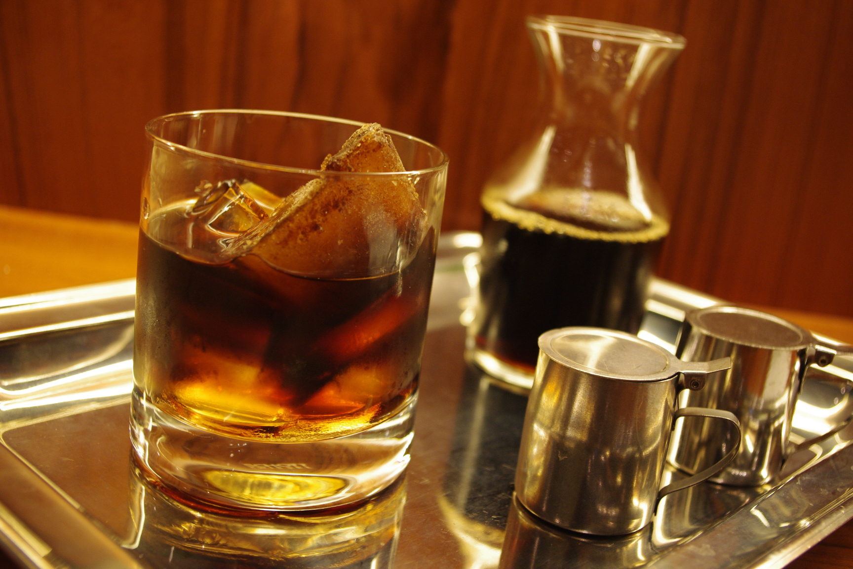 冰滴咖啡